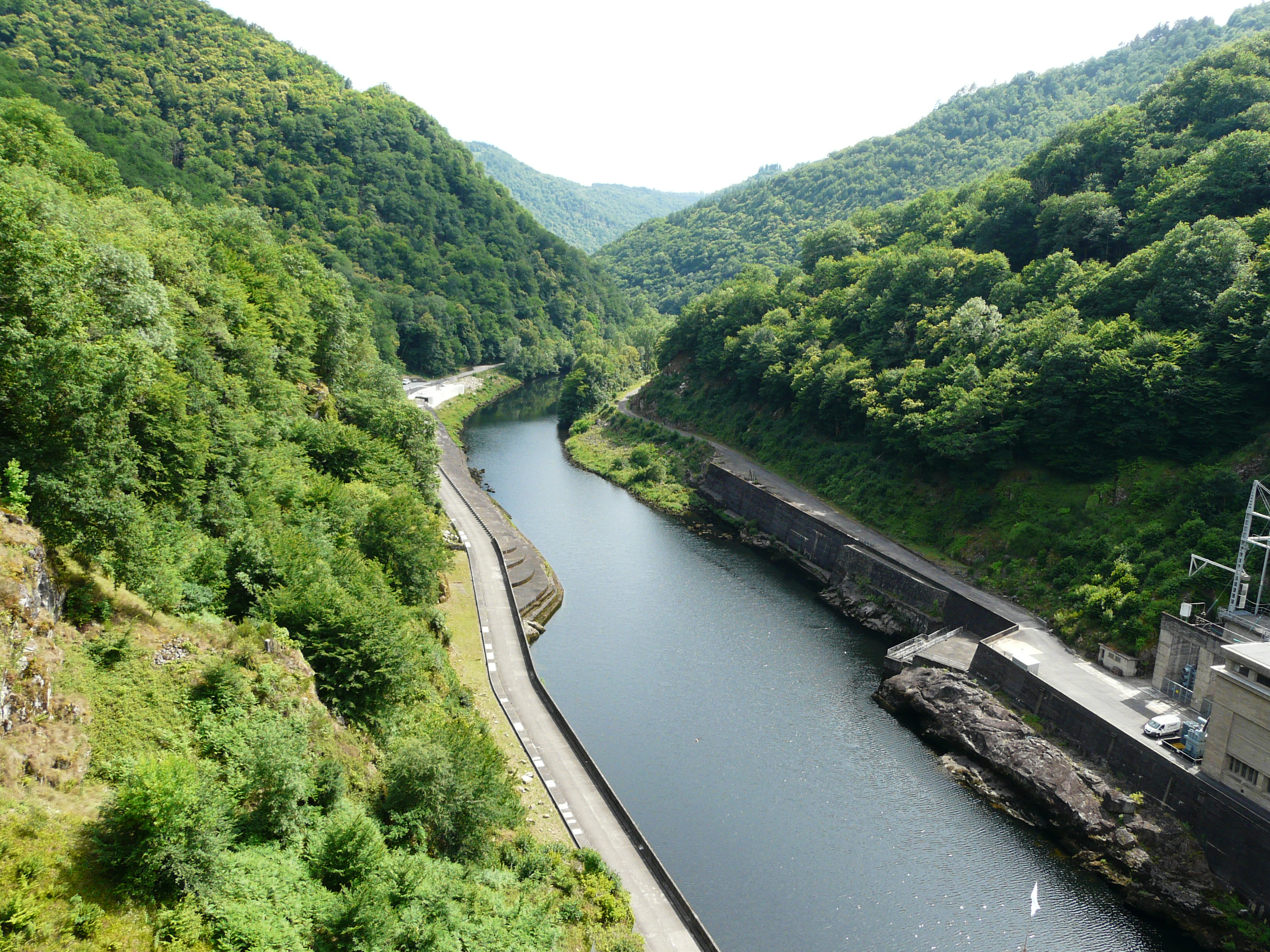 La Dordogne juste en aval du barrage du Chastang, entre les communes de Servières-le-Château (à gauche) et Saint-Martin-la-Méanne (à droite), Corrèze, France.